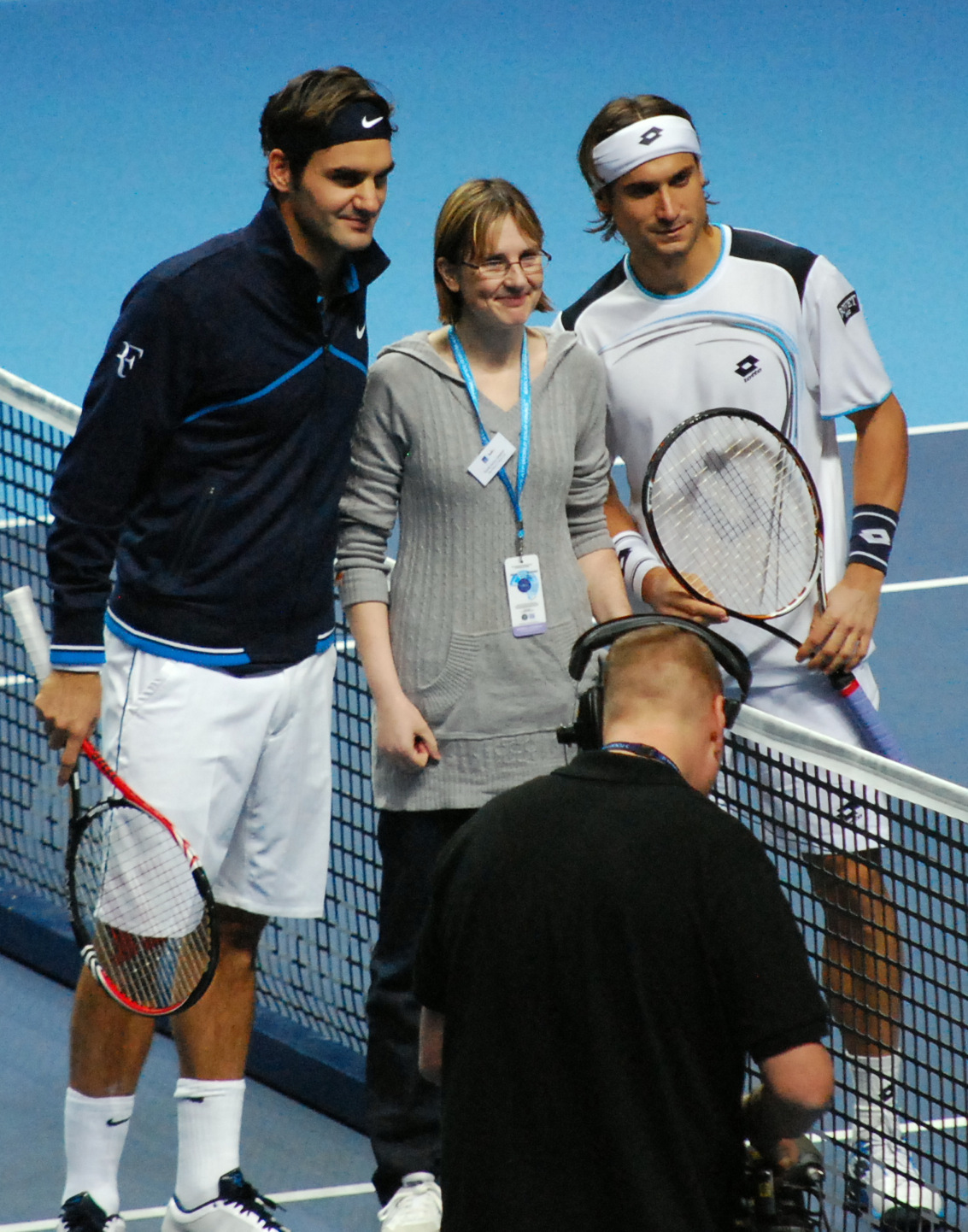 Roger Federer & David Ferrer